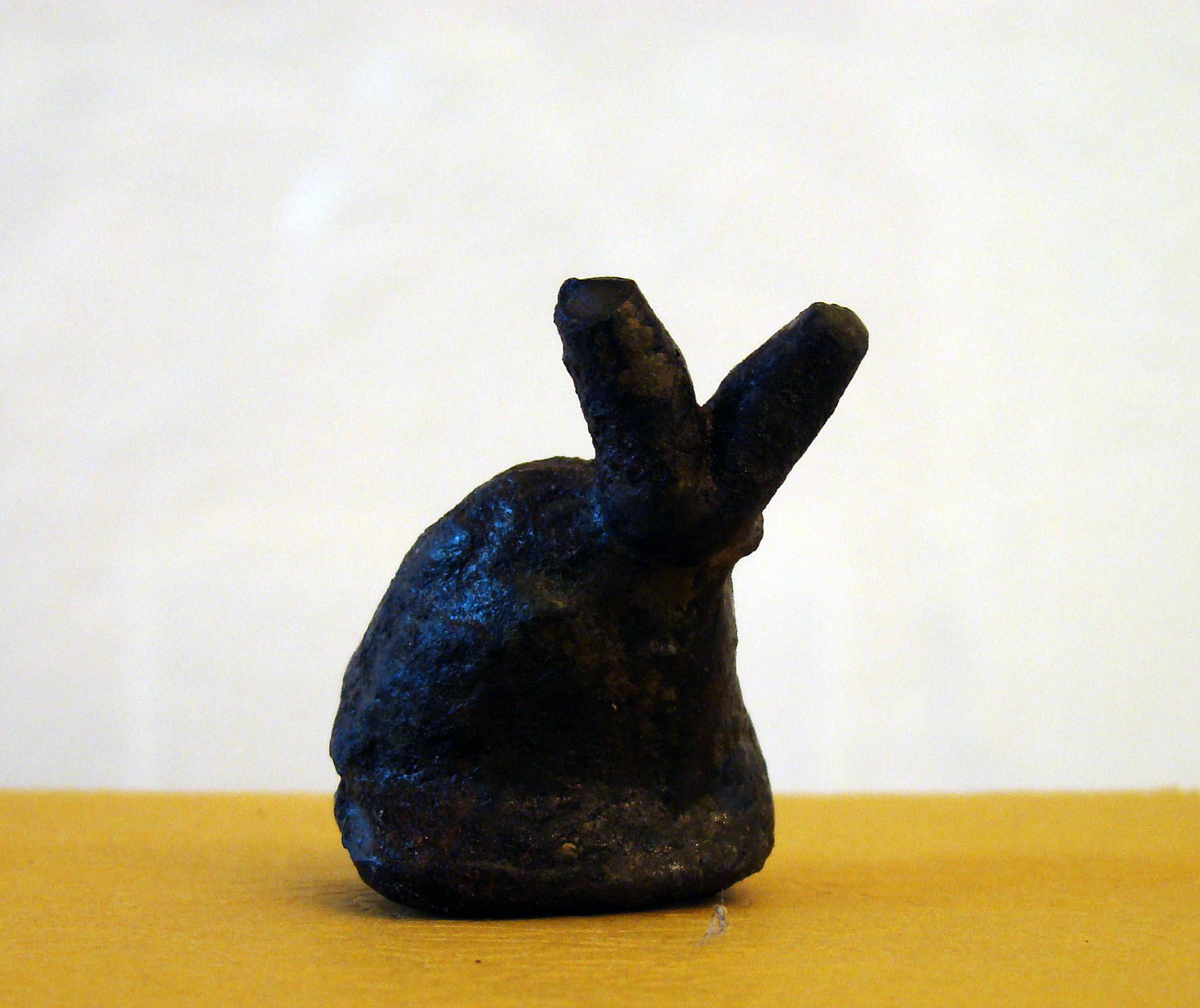 Figurka z brązu w kształcie zajączka znaleziona w osadzie obronnej w Wicinie. Muzeum Archeologiczne Środkowego Nadodrza w Świdnicy.